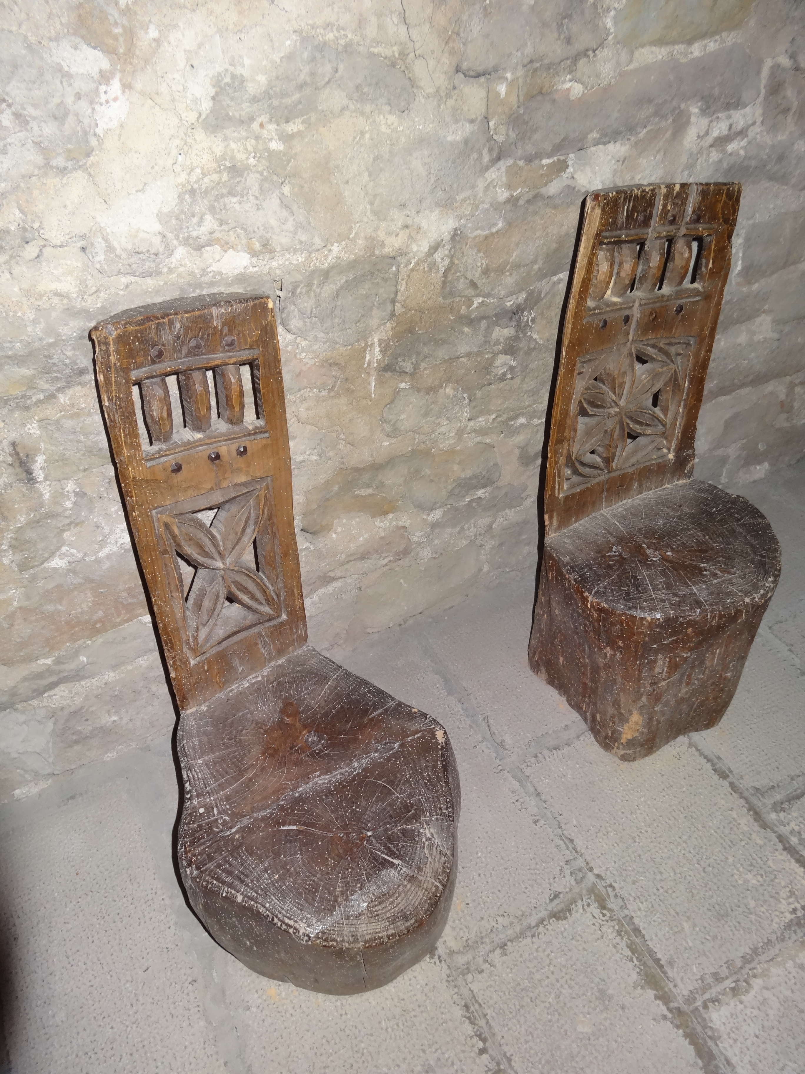 Església de Santa Maria de la Tossa (Santa Margarida de Montbui)